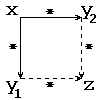 Definição de confluência. Linhas sólidas representam o quantificador universal e linhas tracejadas representam o quantificador existencial.